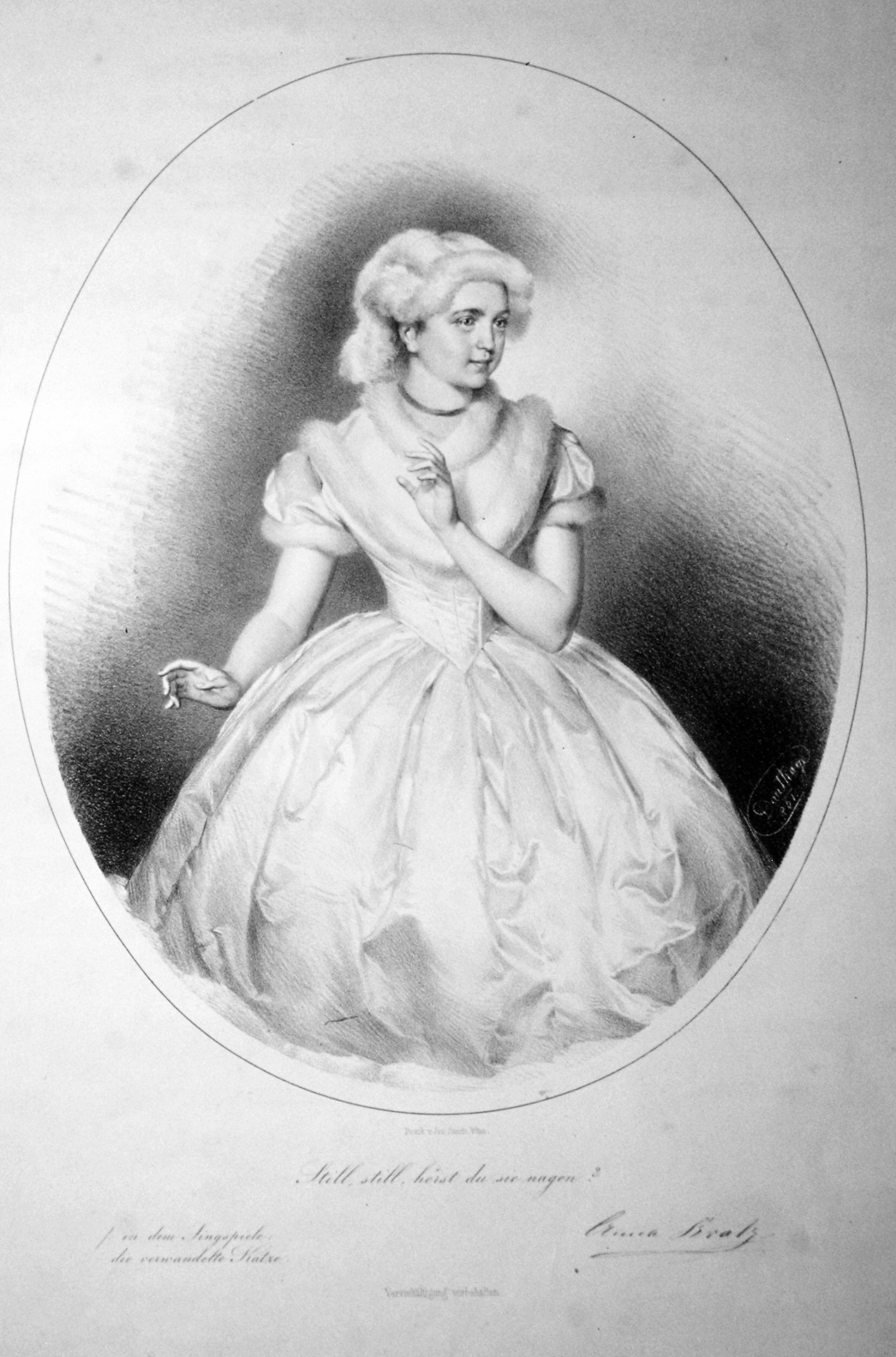 Anna Kratz (1837-1918), deutsche Schauspielerin. Lithographie von Adolf Dauthage, 1861